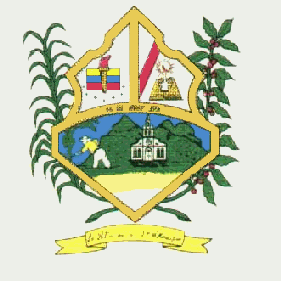 Escudo del municipio Zea, estado Mérida, Venezuela